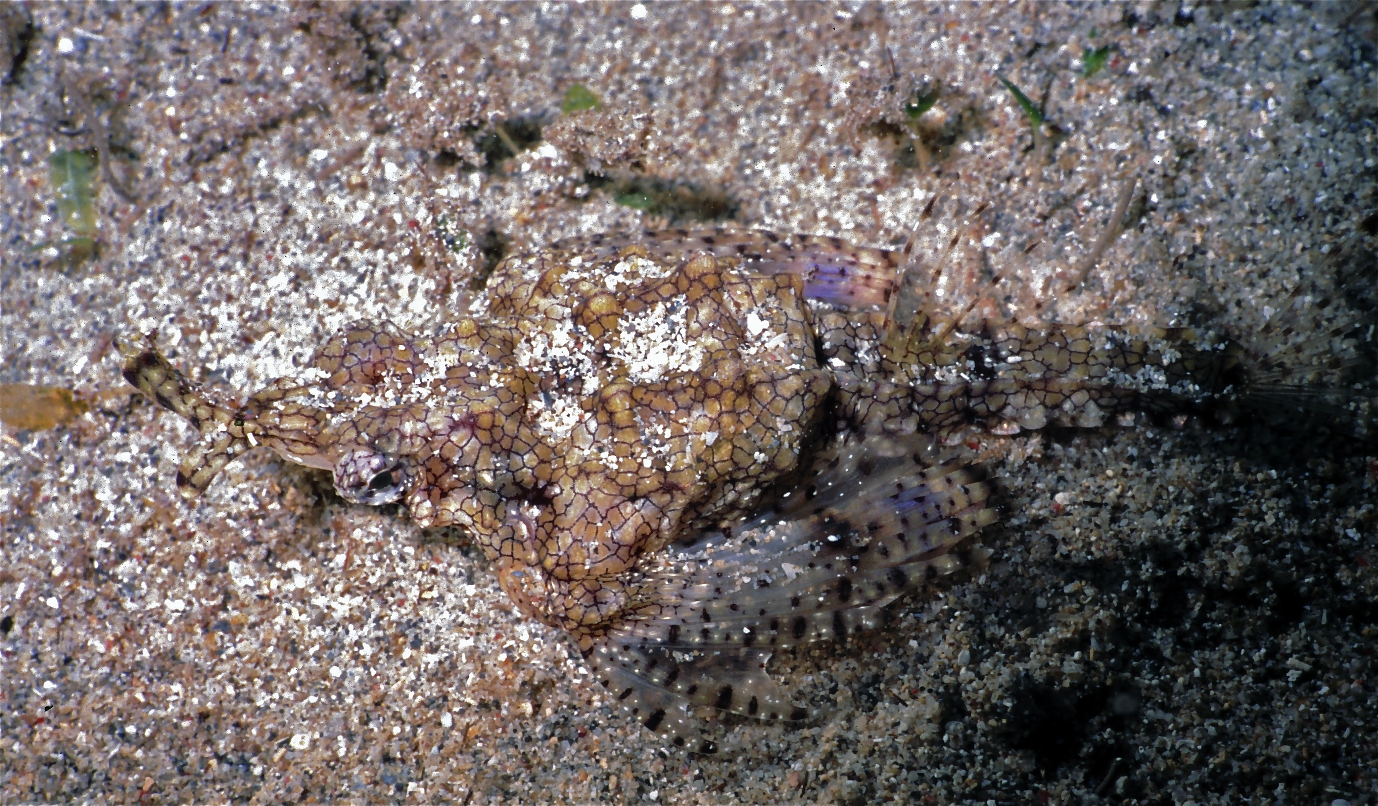 Bunaken, Sulawesi, INDONESIA